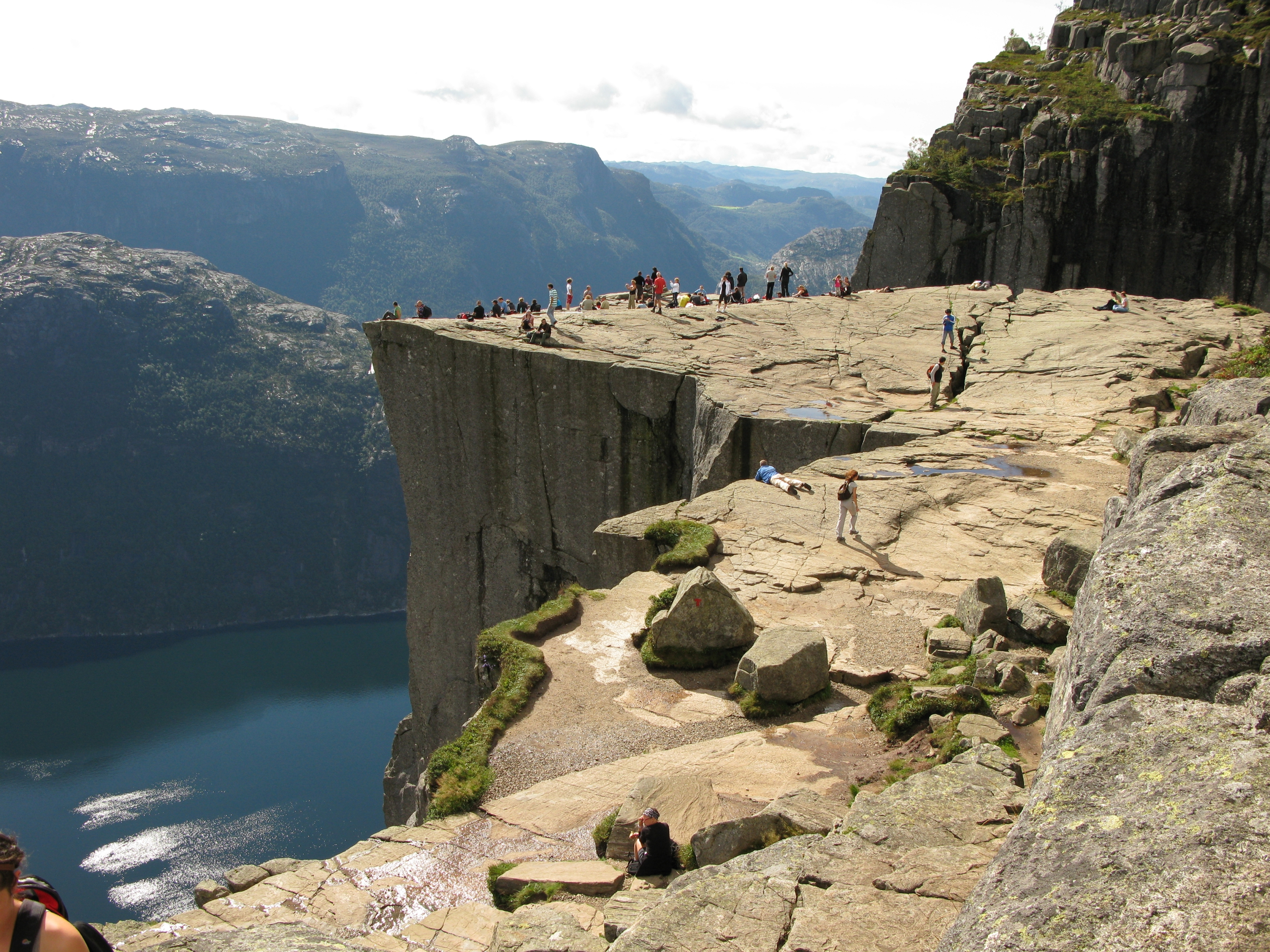 Preikestolen, Norway, 2010.